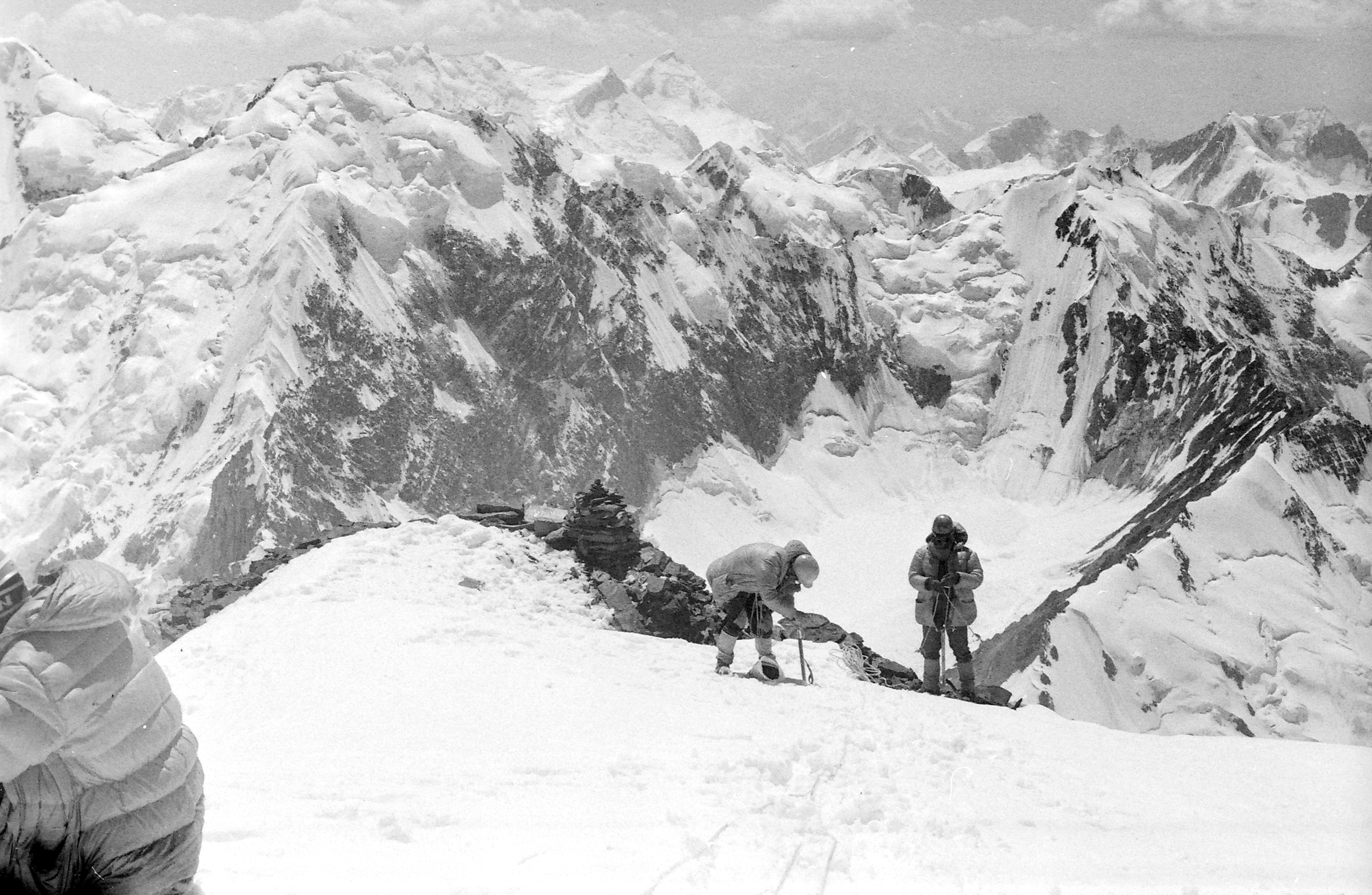 Ekspeditsioon mäetipule "Tartu Ülikool 350".